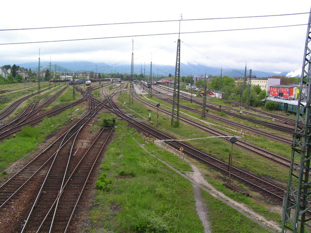 Bahnhof Freilassing, 13 km from Bad Reichenhall, Deutschland (Zone 33). Dem Bahnhof Freilassing kommt als Grenzbahnhof und Knotenpunkt gr?e Bedeutung zu.